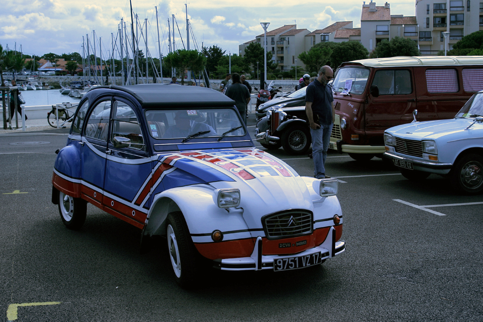 Citroen 2CV Basket